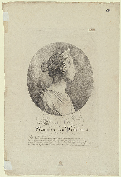 Profilbildnis von Königin Luise